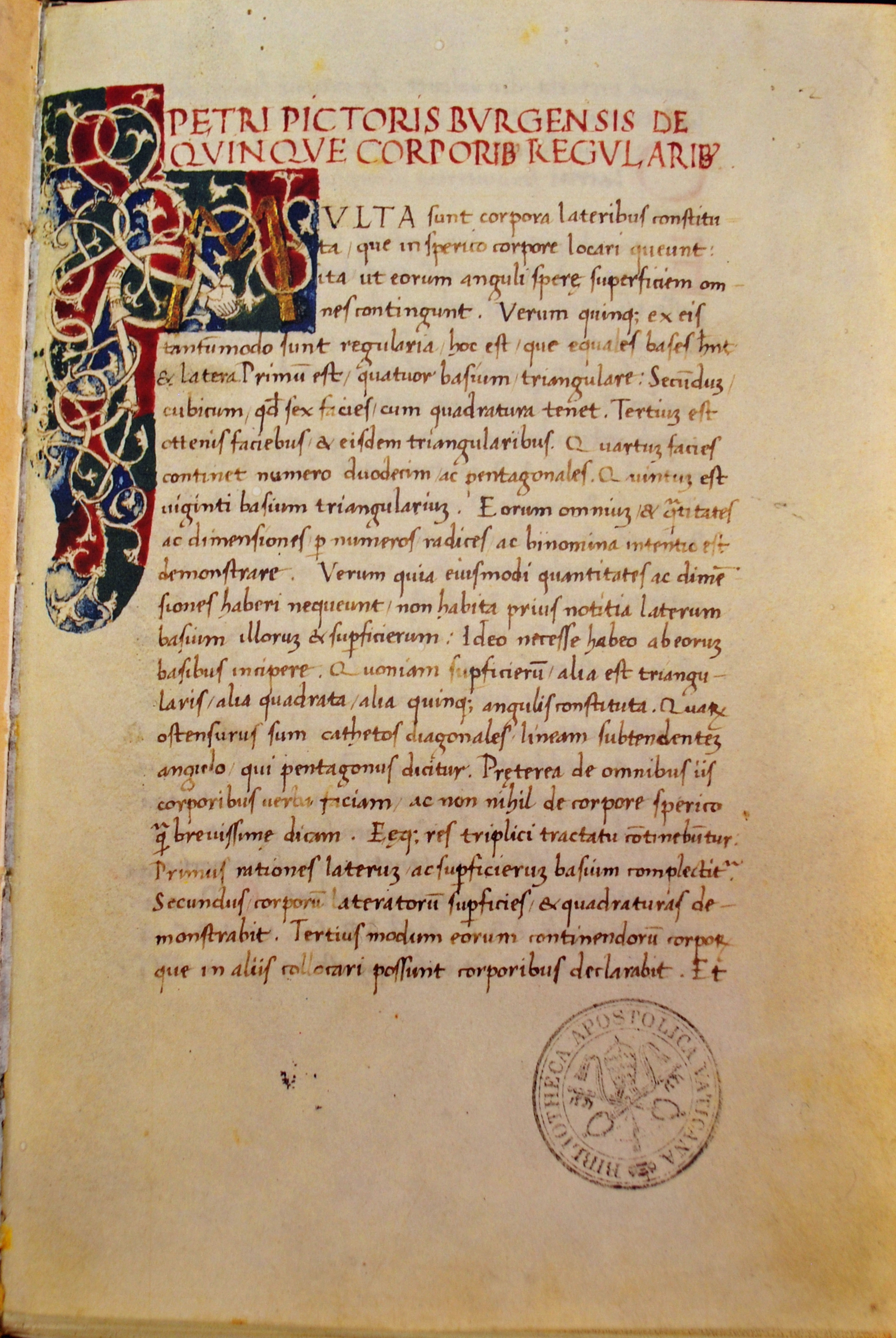 Piero della Francesca - Libellus de quinque corporibus regularibus - p1b